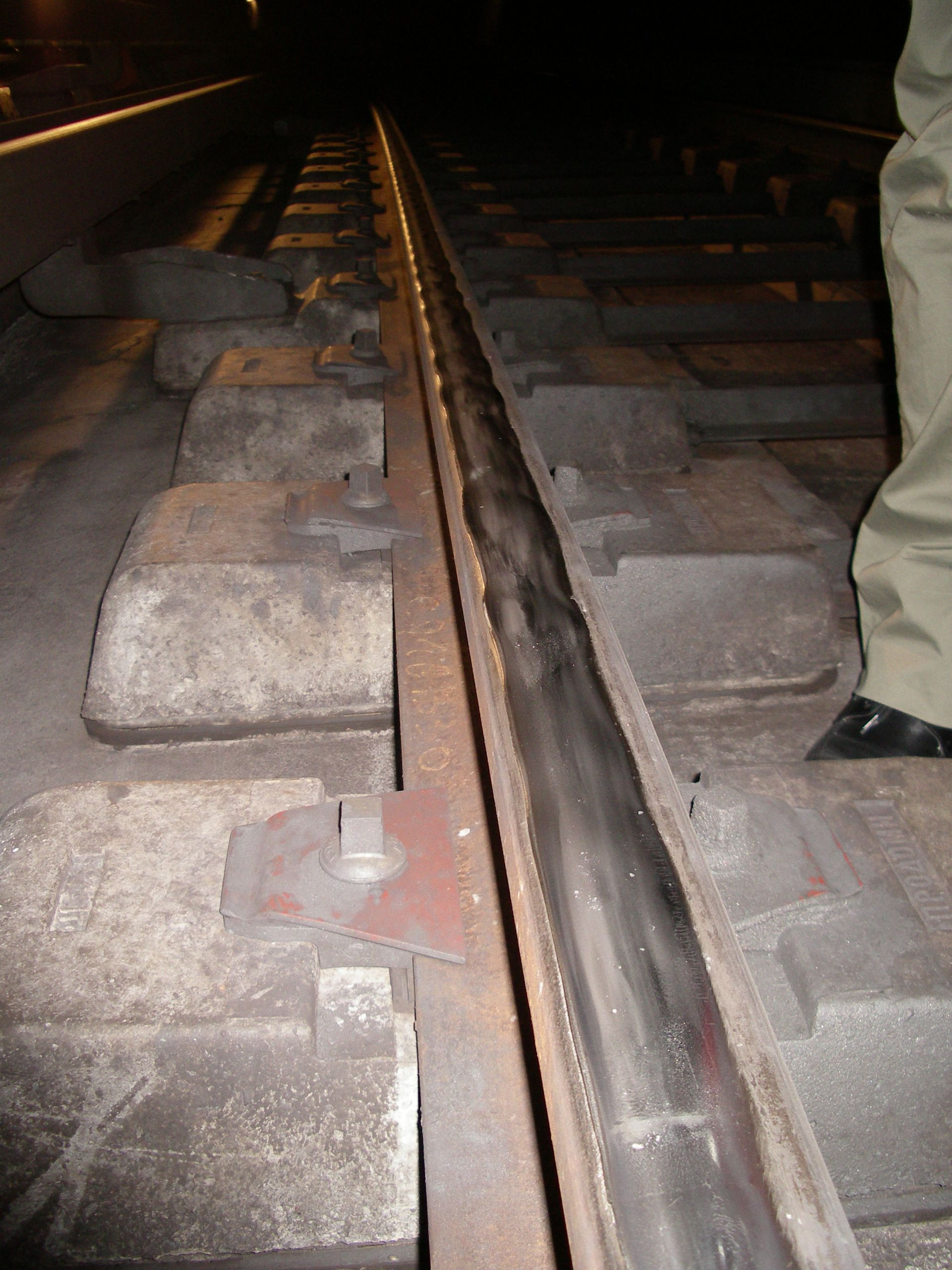 kurze Wellen auf einer Schienenoberfläche (können zu Schäden am Fahrwerk führen) Foto vom IFB Institut für Bahntechnik GmbH (Berlin) zur Verfügung gestellt